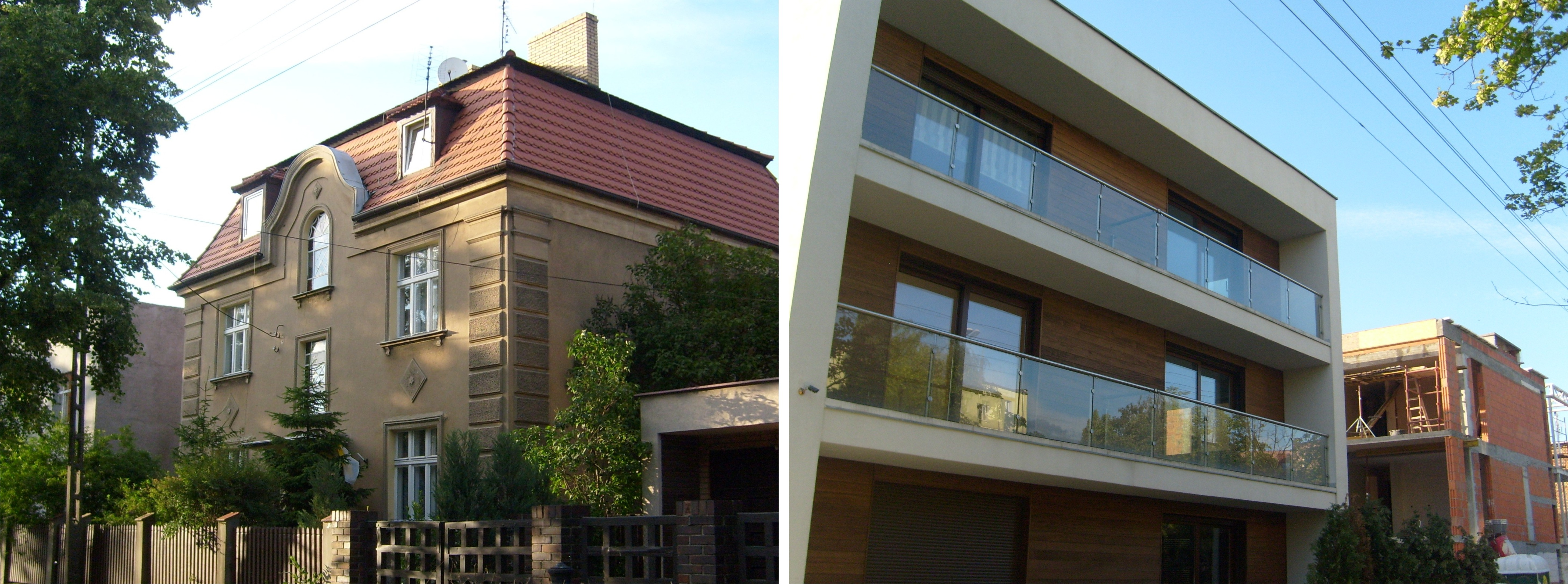 Wille miejskie na osiedlu Raszyn w Poznaniu